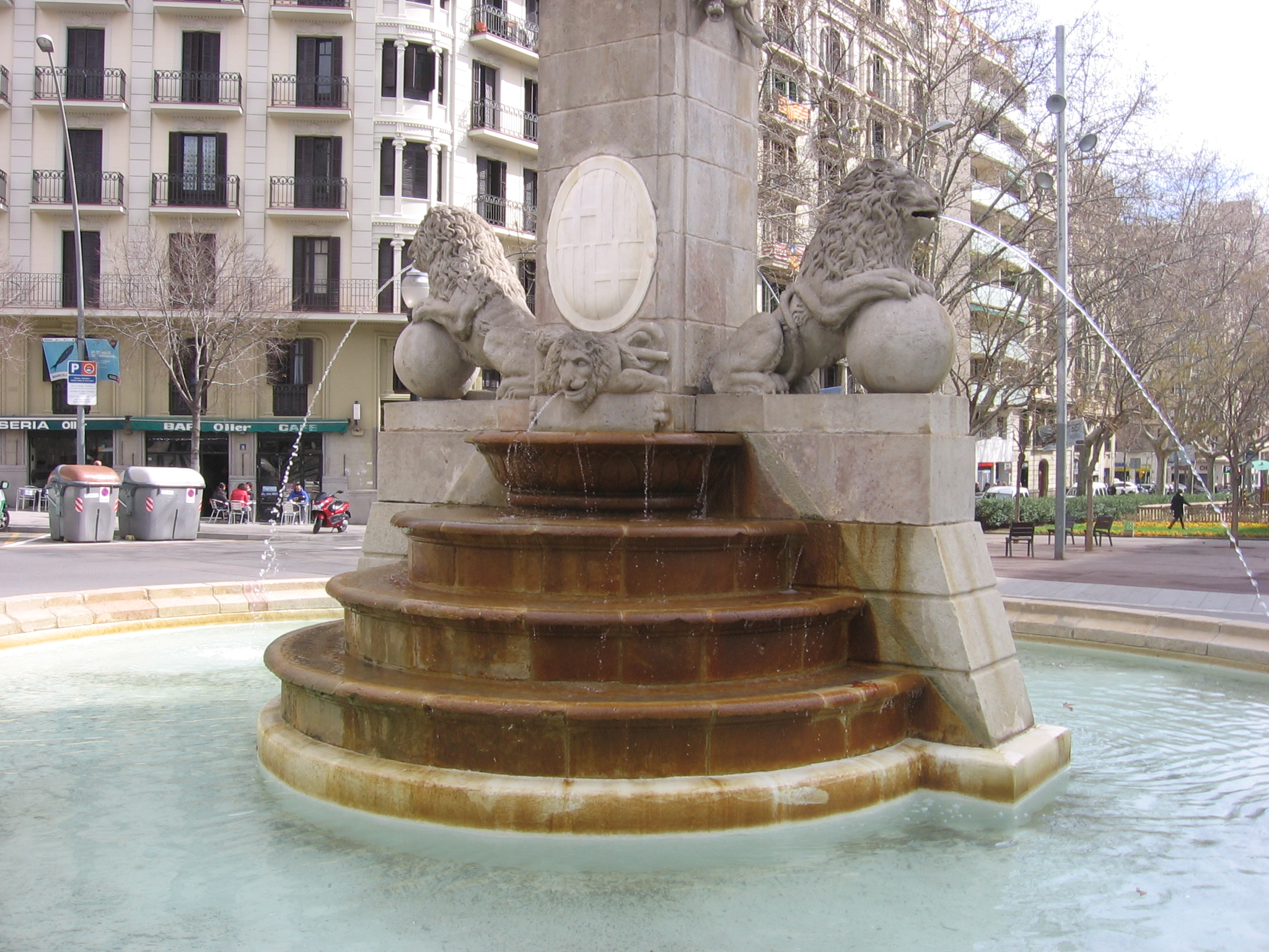 Fuente de Hércules (1802), de Josep Moret y Salvador Gurri.